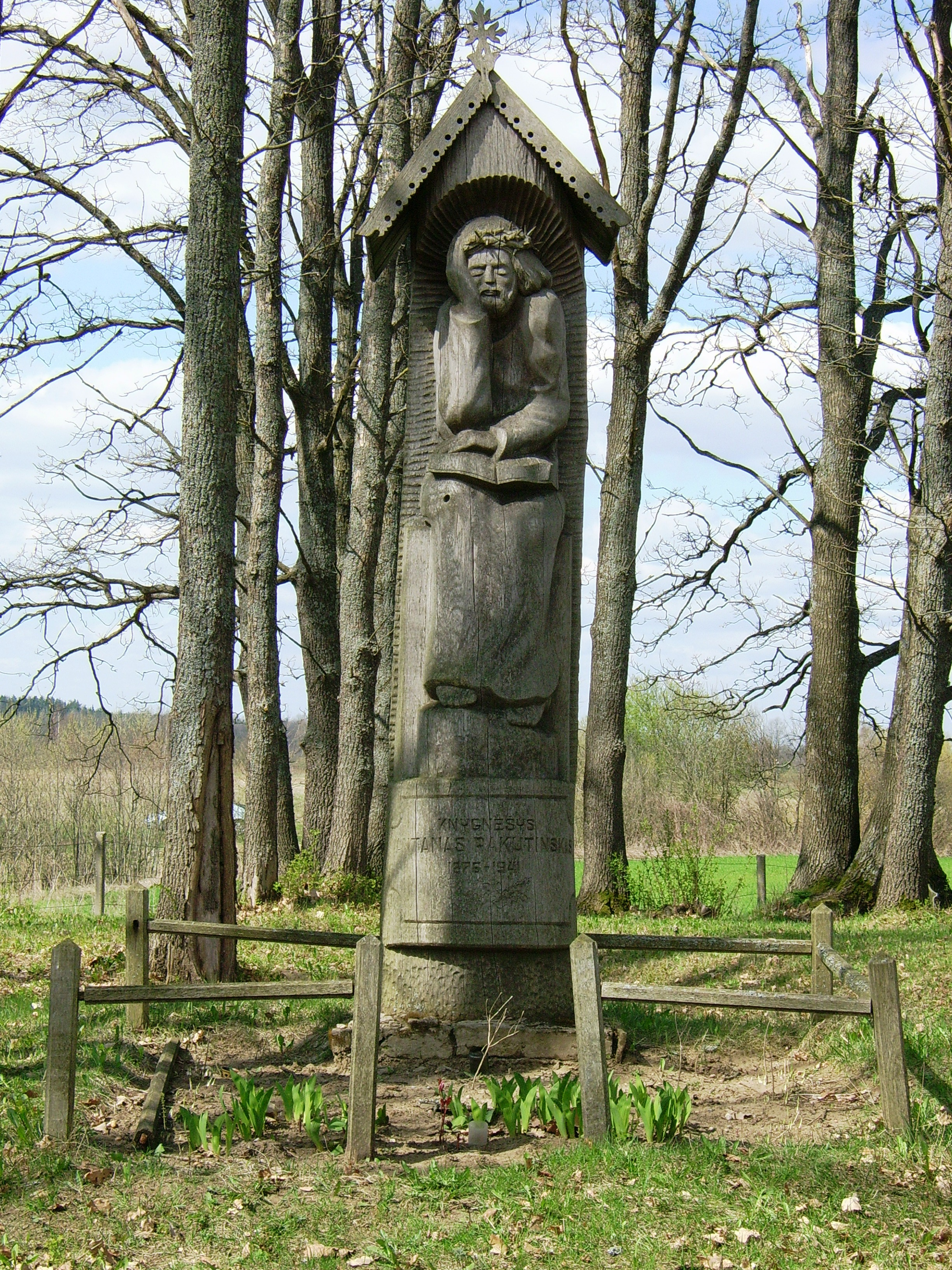 Rekstukų kapinės